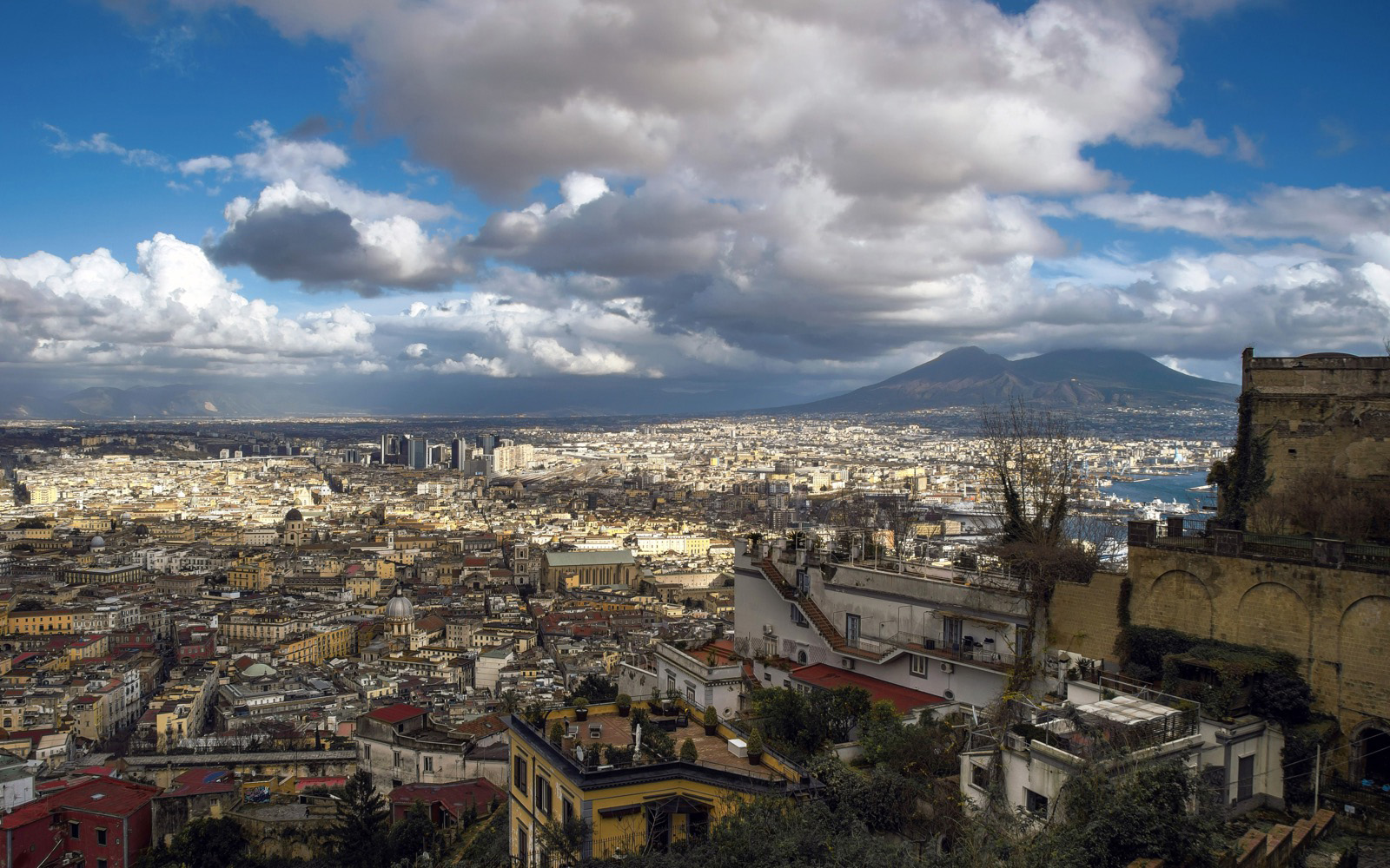 Napoli dalla Certosa di San Martino